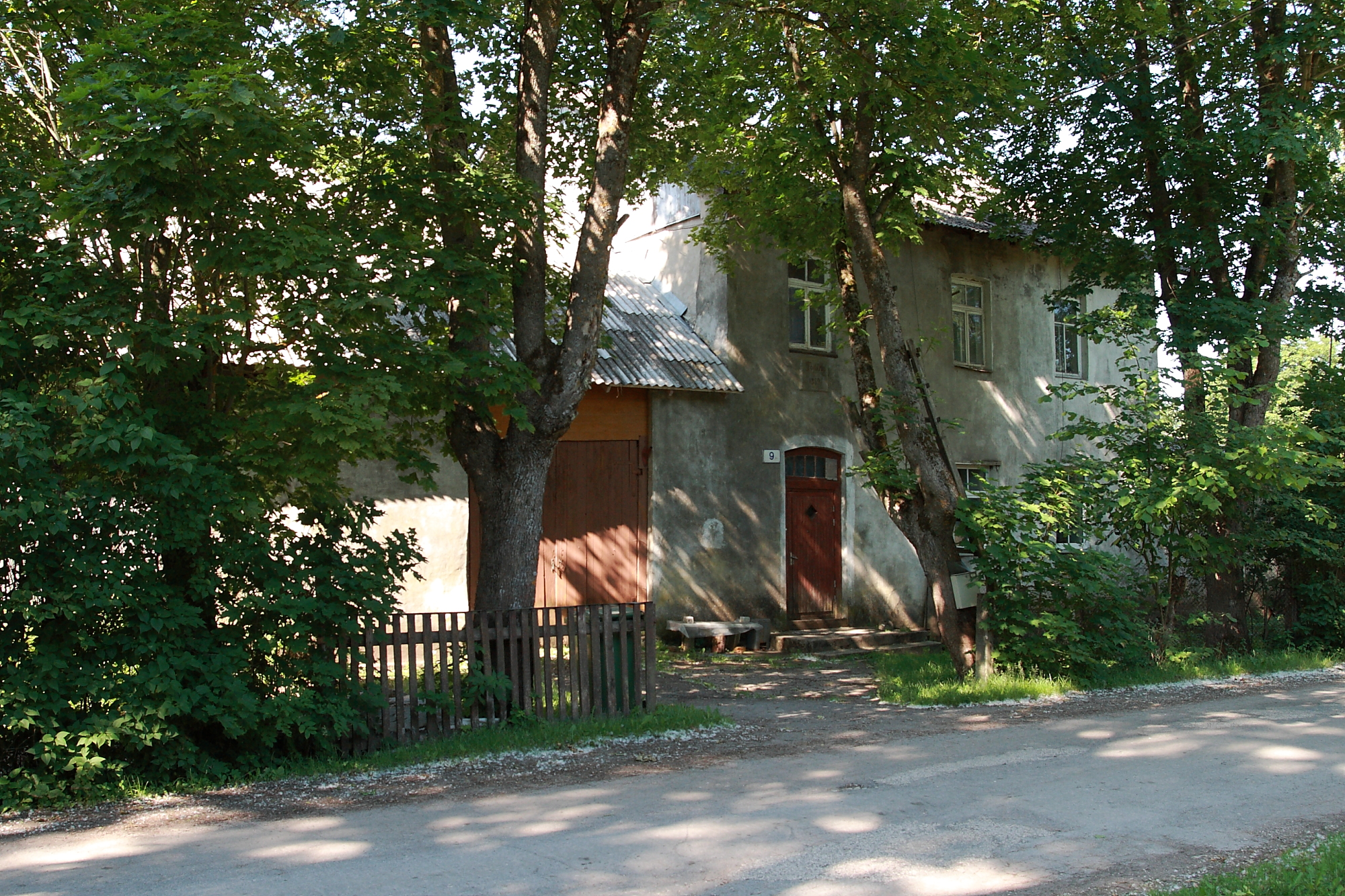 Lehola mõisa viinavabrik, 19.saj